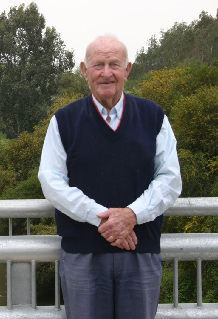 צבי רסקי